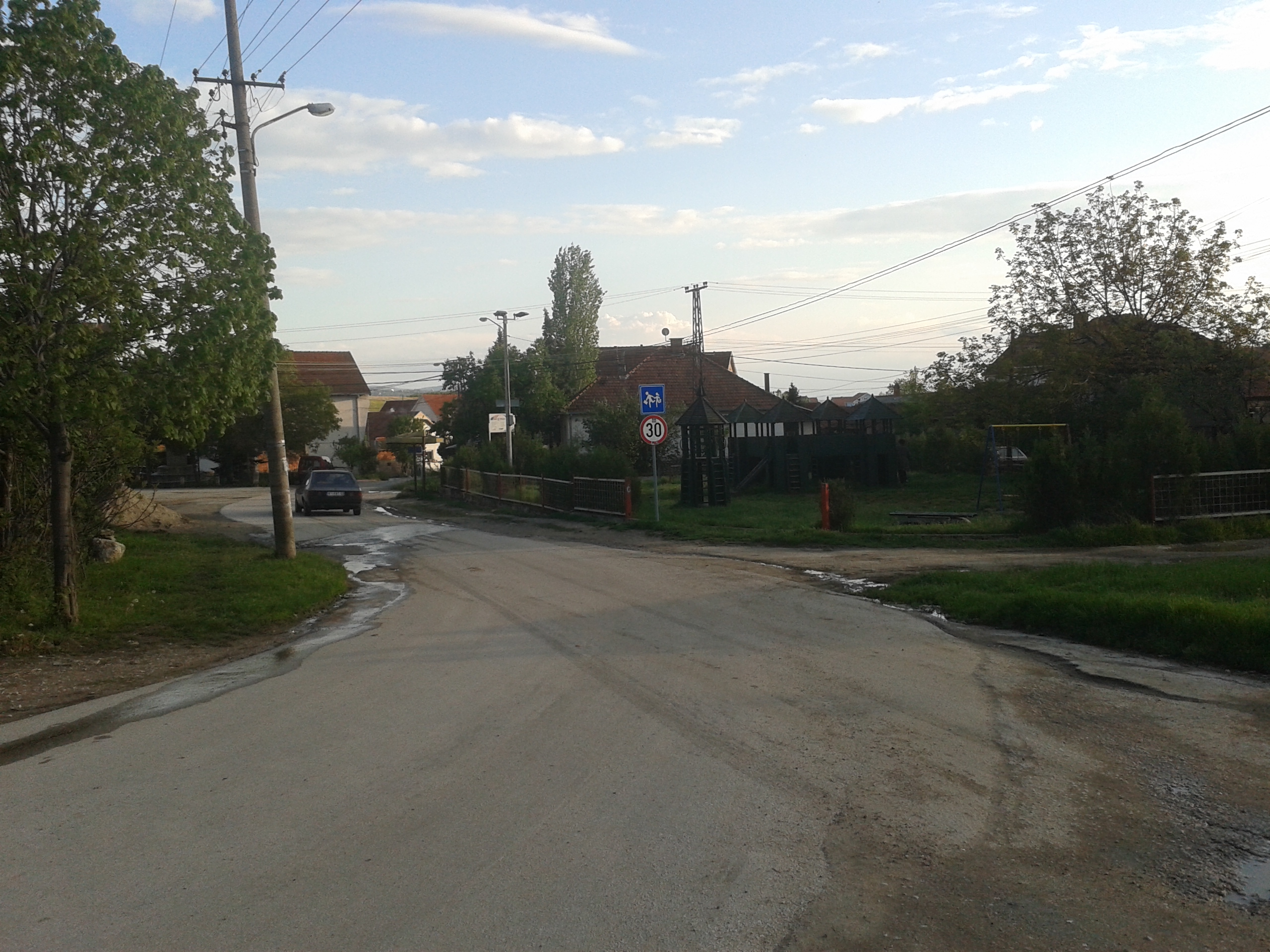 Centar_u_Gornjem_Komrenu